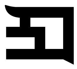 дза пхакпа